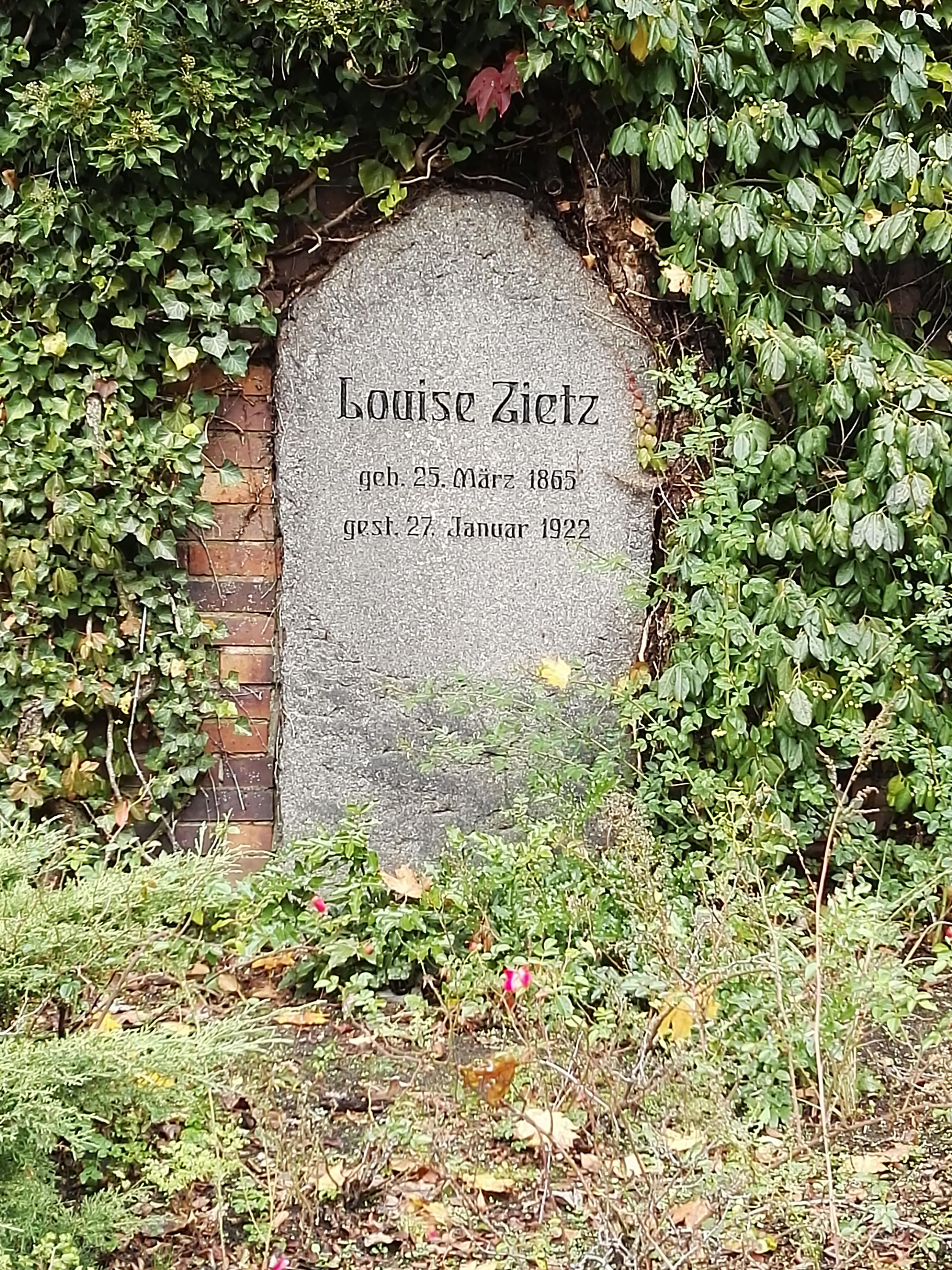 Grab von Luise Zietz in der Gedenkstätte der Sozialisten auf dem Zentralfriedhof Friedrichsfelde in Berlin-Lichtenberg